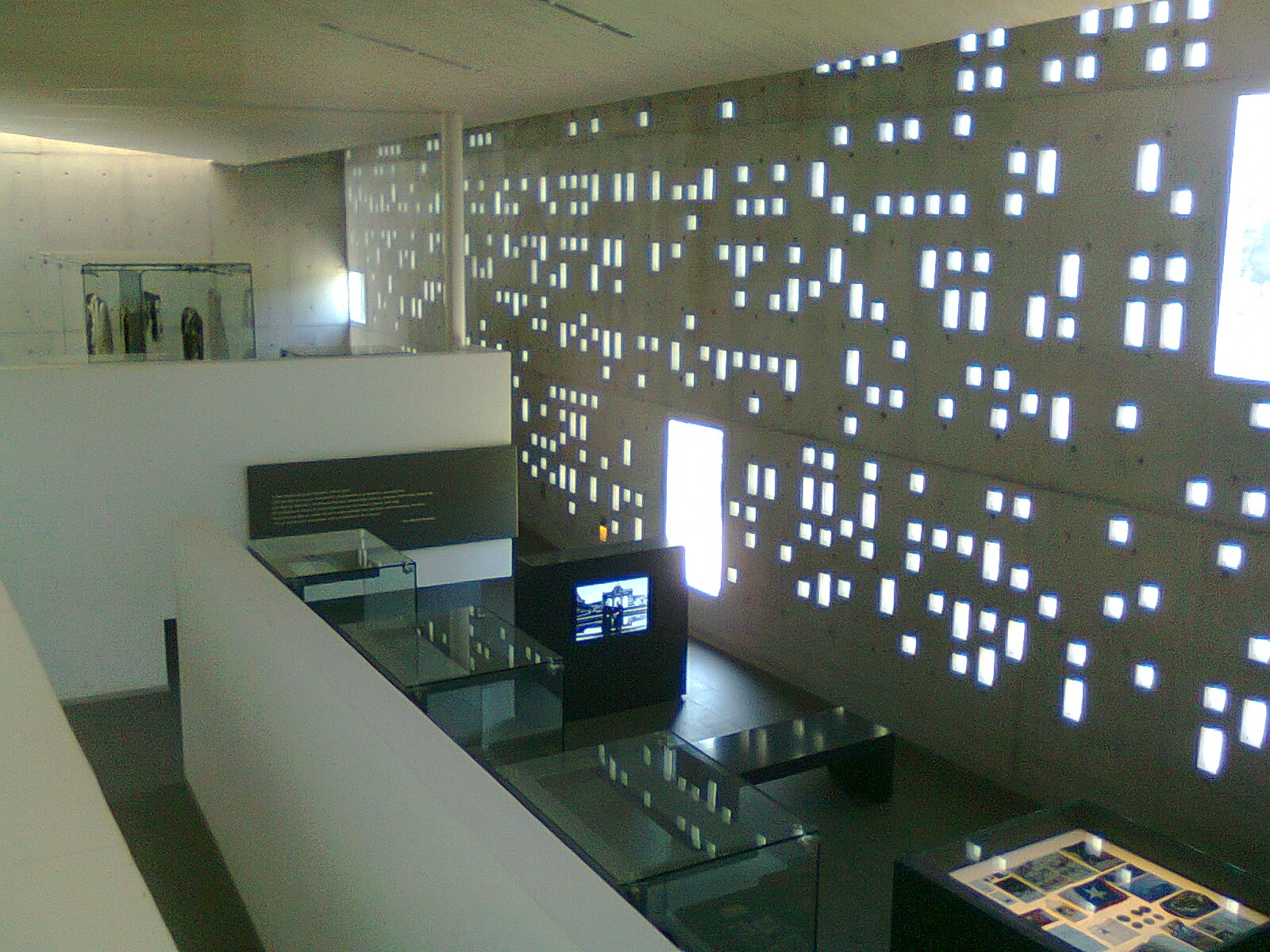 El interior del Museo del Santuario Padre Hurtado ubicado en avenida Padre Hurtado 1090, comuna de Estación Central, en Santiago de Chile.